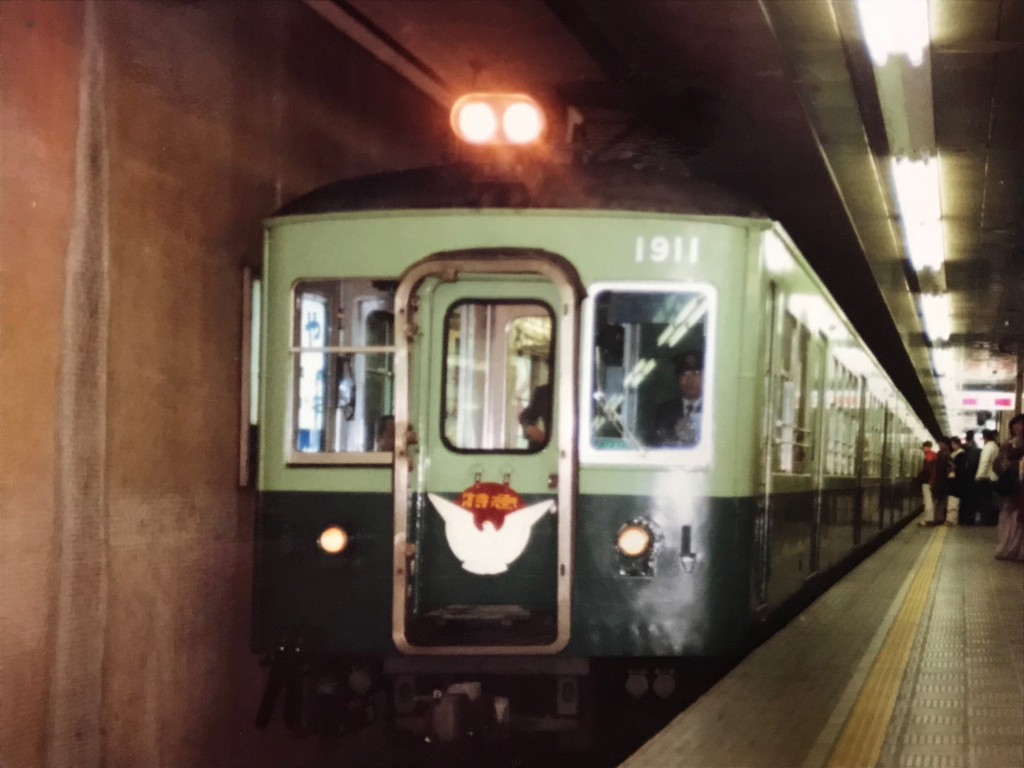 1900系代用特急